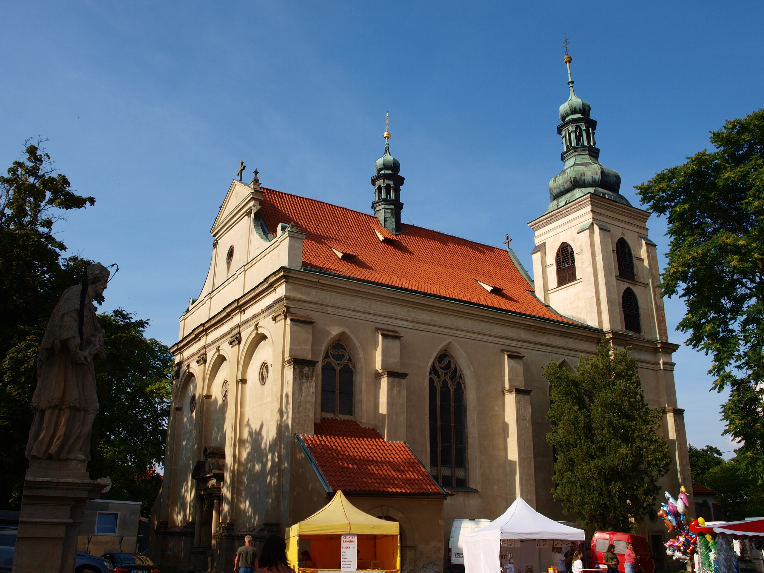 Smečno kostel